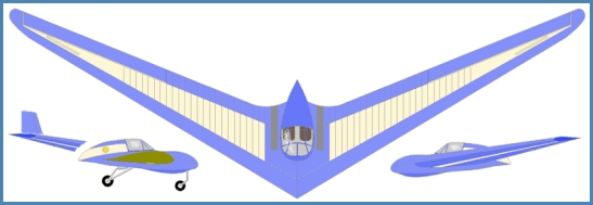 Horten IAe38